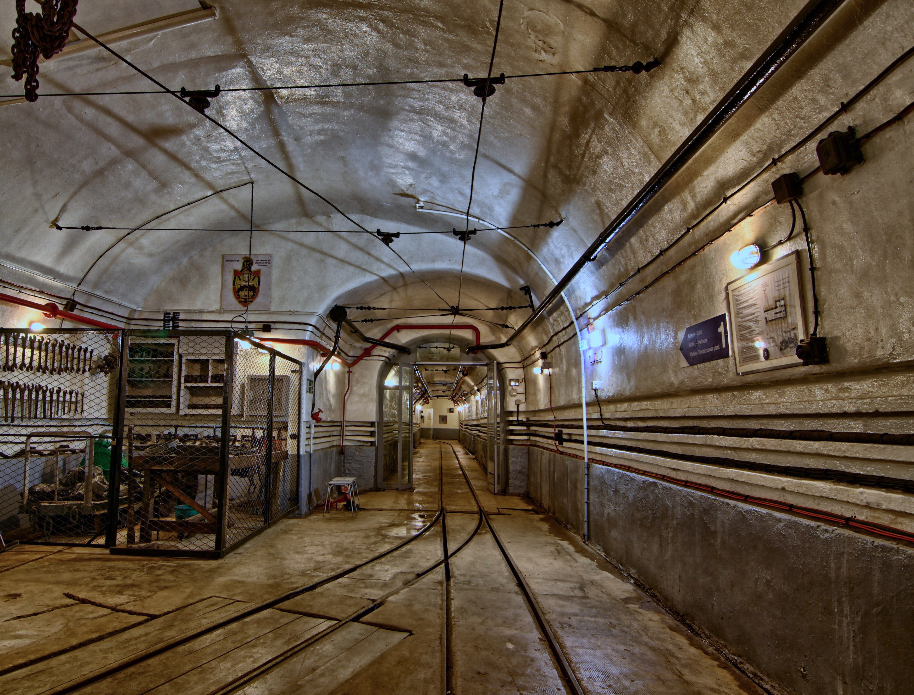 Ligne Maginot - Schoenenbourg